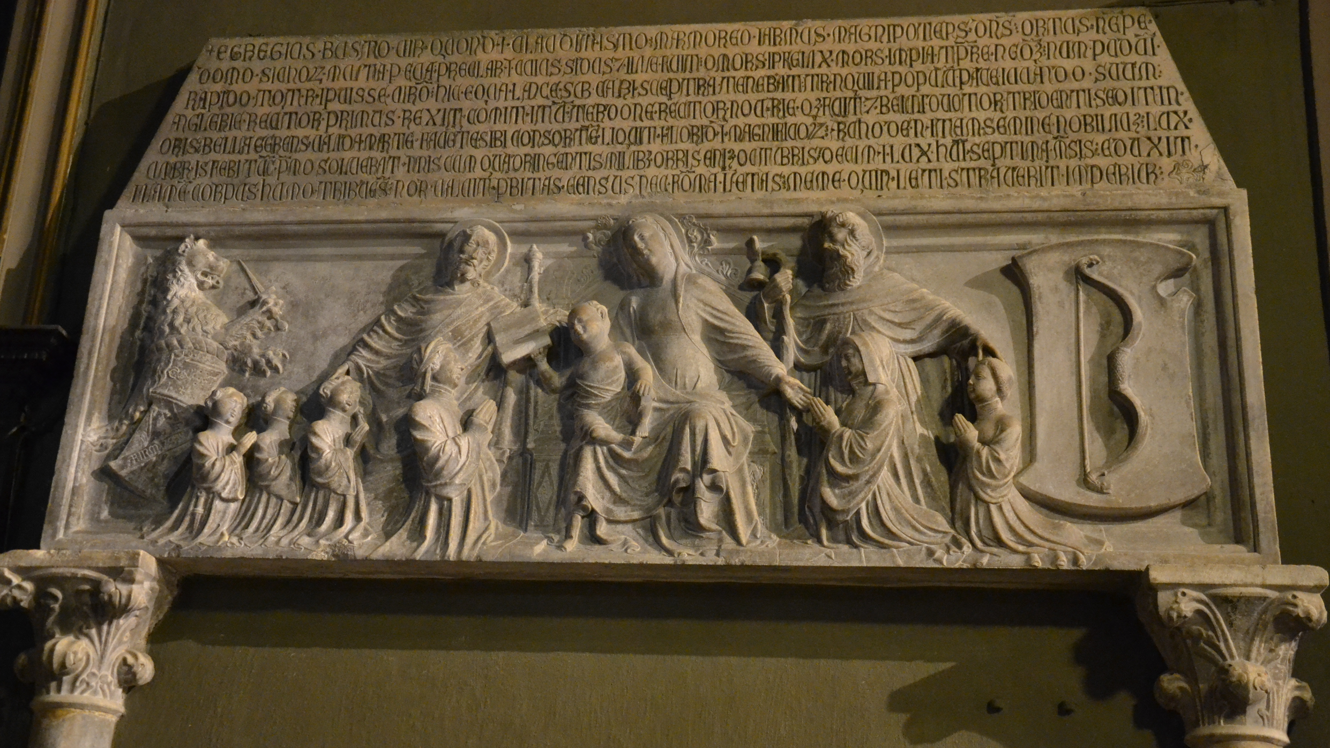 Chiesa dei Santi Fermo e Rustico (Caravaggio). Il sarcofago di Fermo Secco, morto nel 1401, è in parte murato nella parete del transetto di fronte alla cappella del Santissimo Sacramento; vi fu trasportato dalla cappella di Sant'Ambrogio, fondata dalla stessa famiglia Secco. Il bassorilievo sul lato del sarcofago raffigura la Vergine col Bambino tra sant'Antonio abate e san Marco, i quali le affidano simbolicamente la famiglia Secco; sulla sinistra sono raffigurati il padre Fermo e i tre figli Gianluigi, Marco ed Emanuele, mentre sulla destra compaiono la madre, Florida dei conti d'Arco, e la figlia Antonia. Ai due lati sono rappresentati gli stemmi dei rispettivi casati. Il fastigio soprastante ospita un epitaffio in distici latini, che narra le imprese di Fermo, tessendone un elogio. La grafia è gotica, come lo è il resto del sarcofago. Fermo Secco vi è descritto come signore di Calcio e castellano di Angera, di Dertona e di Novara, oltre che valoroso condottiero presso i confini di Trento.